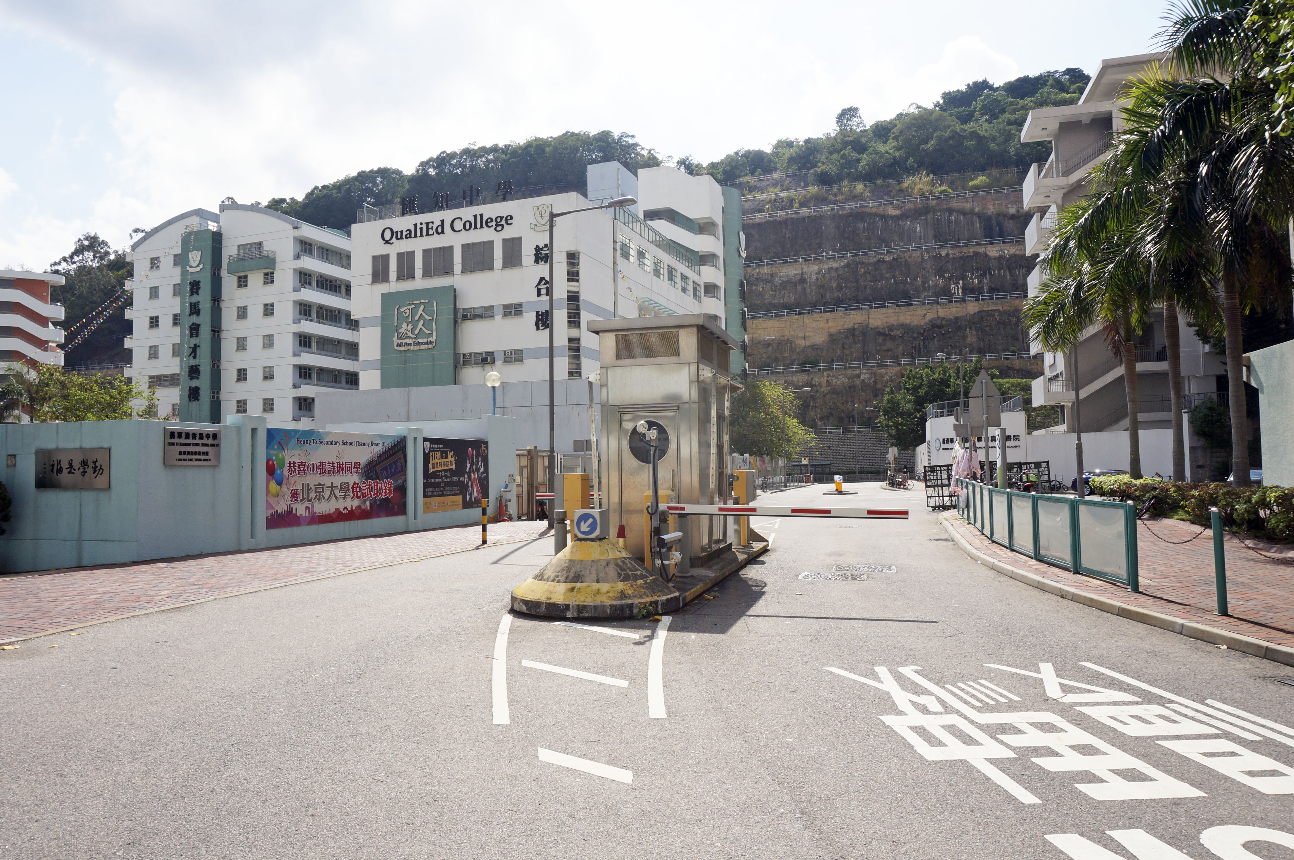 調景嶺勤學里西段部分